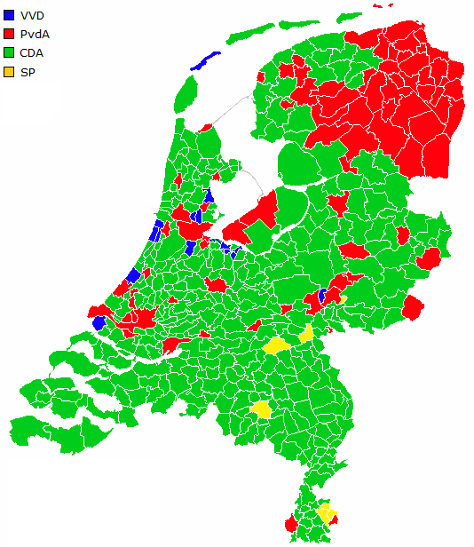 based on Image:Nederland gemeenten 2006.png & [1]